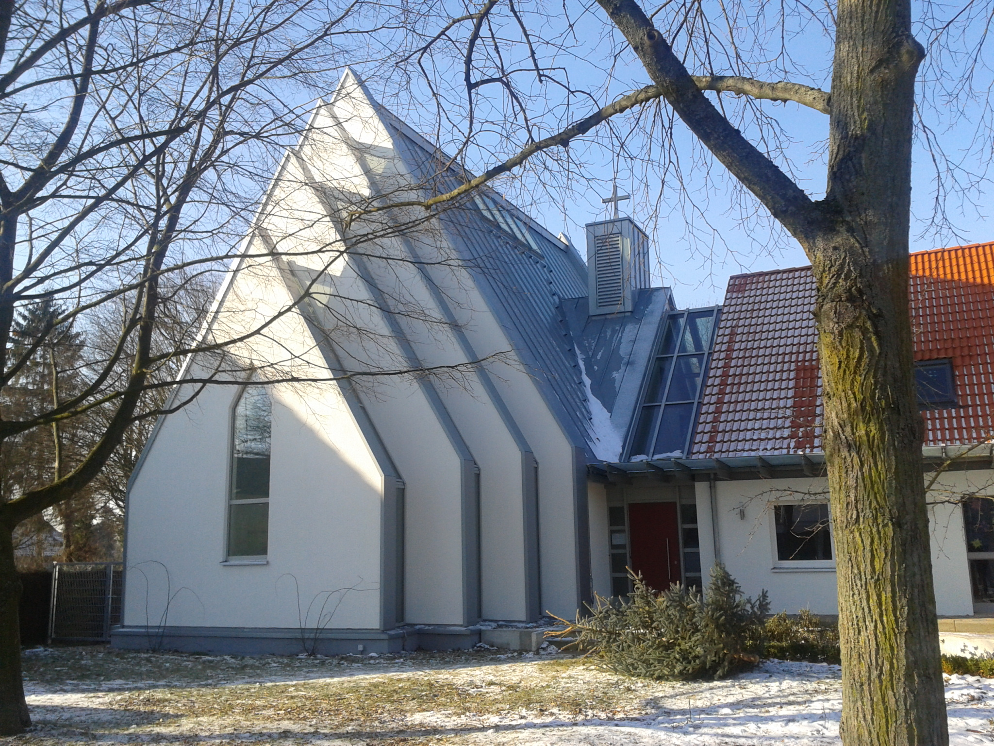 Hannover-Kirchrode, Brabeckstraße, Alt-katholische Kirche